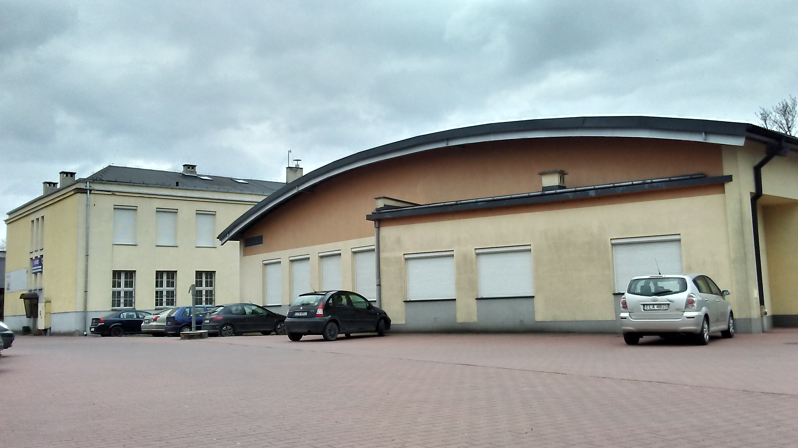 Tomaszów Mazowiecki, województwo łódzkie. Filia Universytetu Łódzkiego w Tomaszowie. PL,EU, CC0